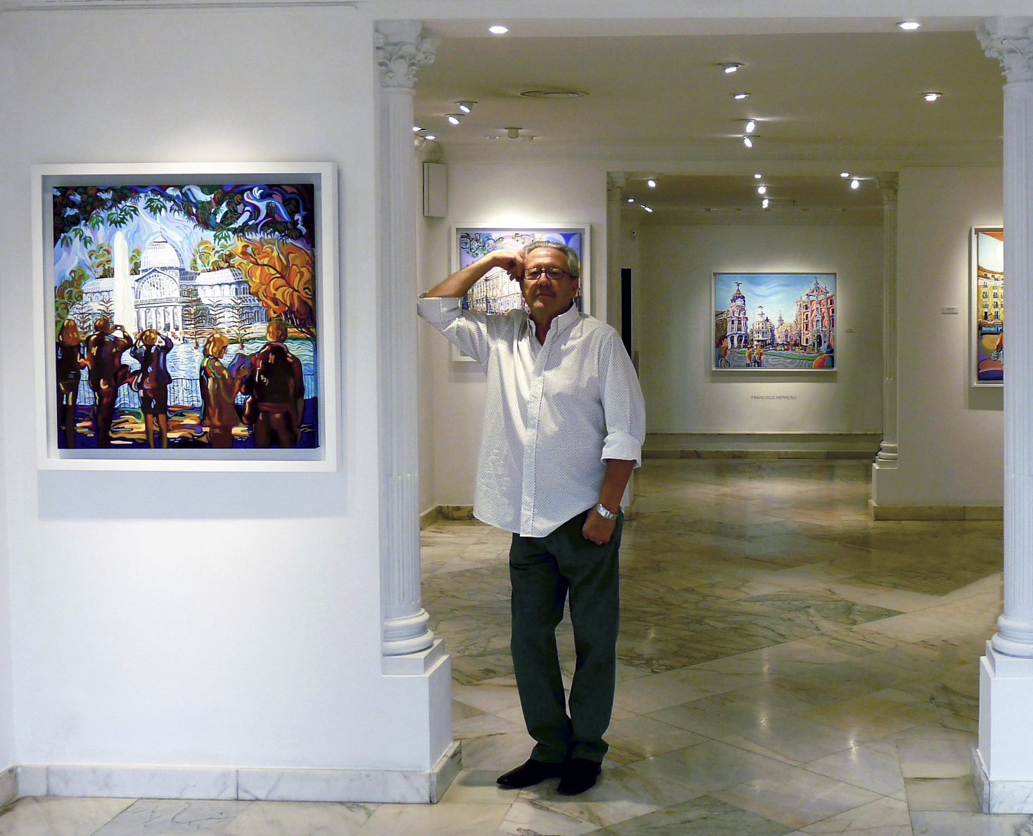 Francisco Herrero en 2016